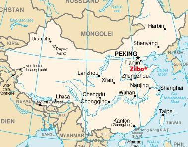 Lage der Stadt Zibo.